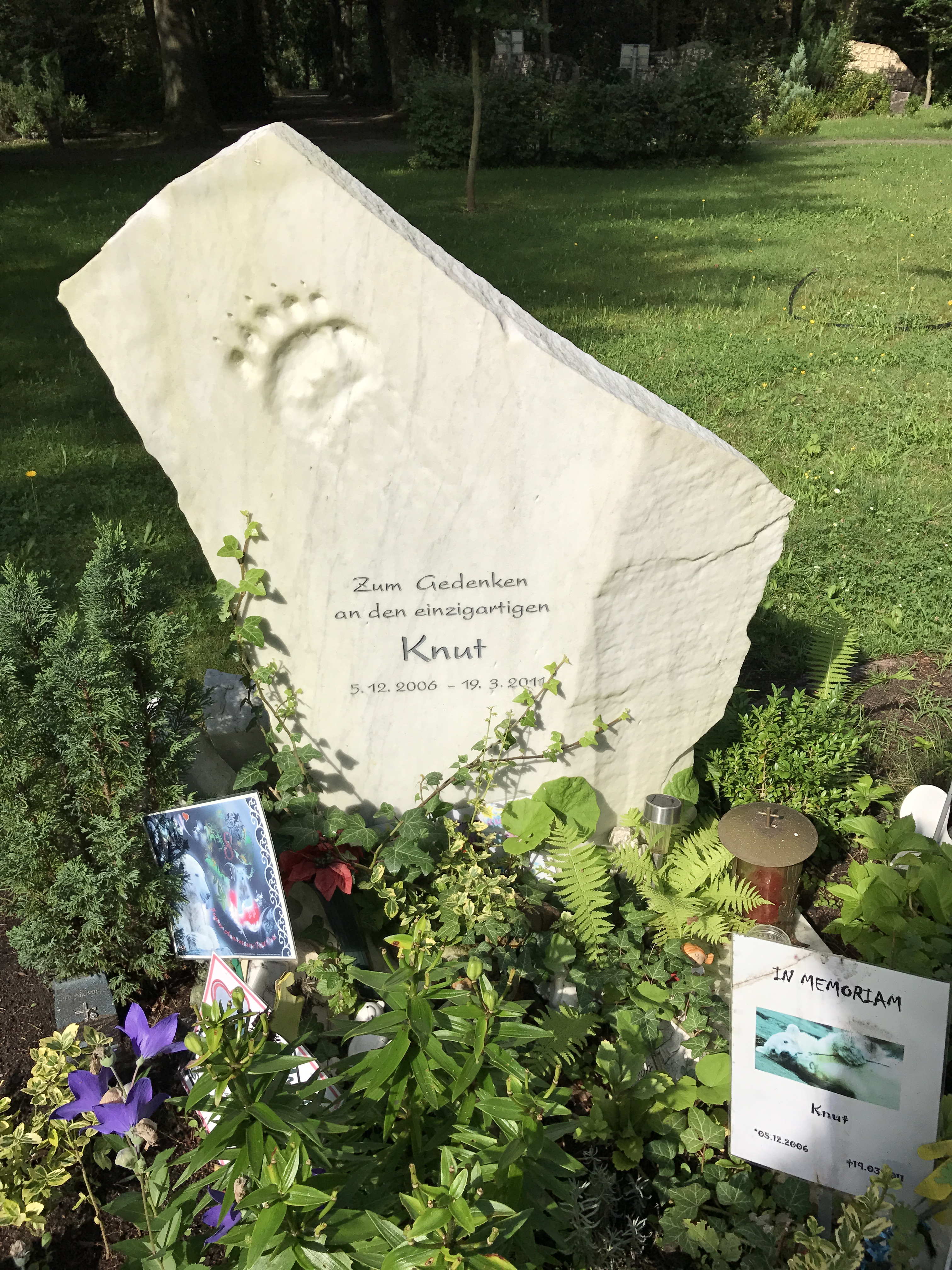 Knut-Denkmal auf dem Spandauer Friedhof In den Kisseln zur Erinnerung an den Eisbären Knut im Zoologischen Garten Berlins, neben dem Grabmal des Tierpflegers von Eisbär Knut, Thomas Dörflein